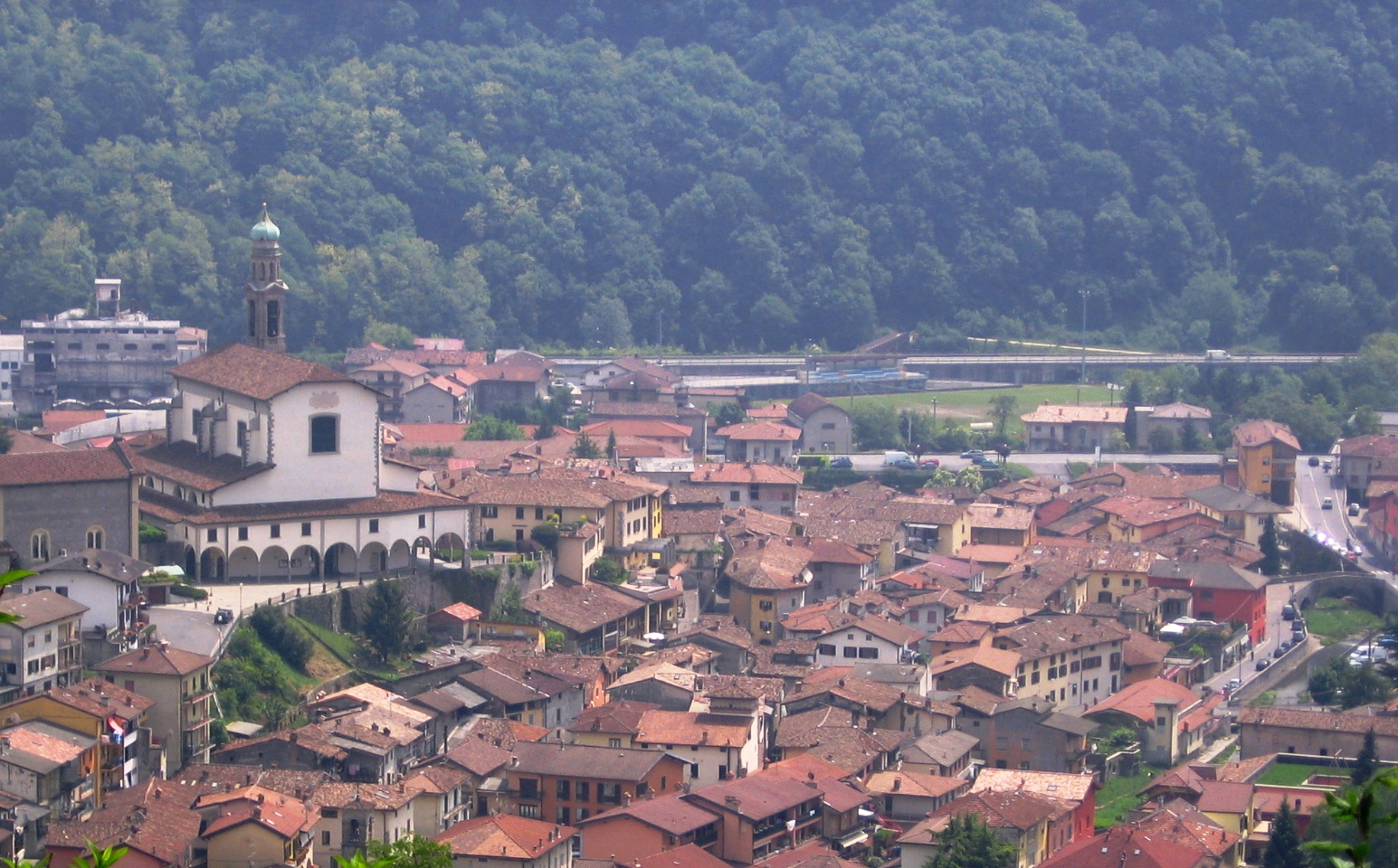 Vertova, Italia, Bergamo, Italia